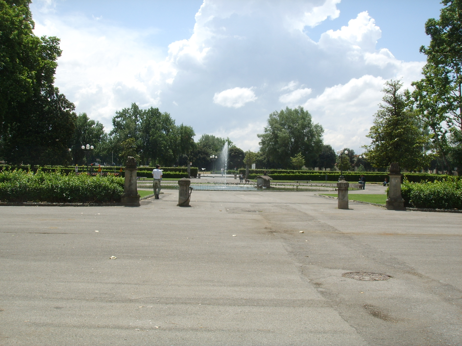 Piazzale kennedy alle cascine